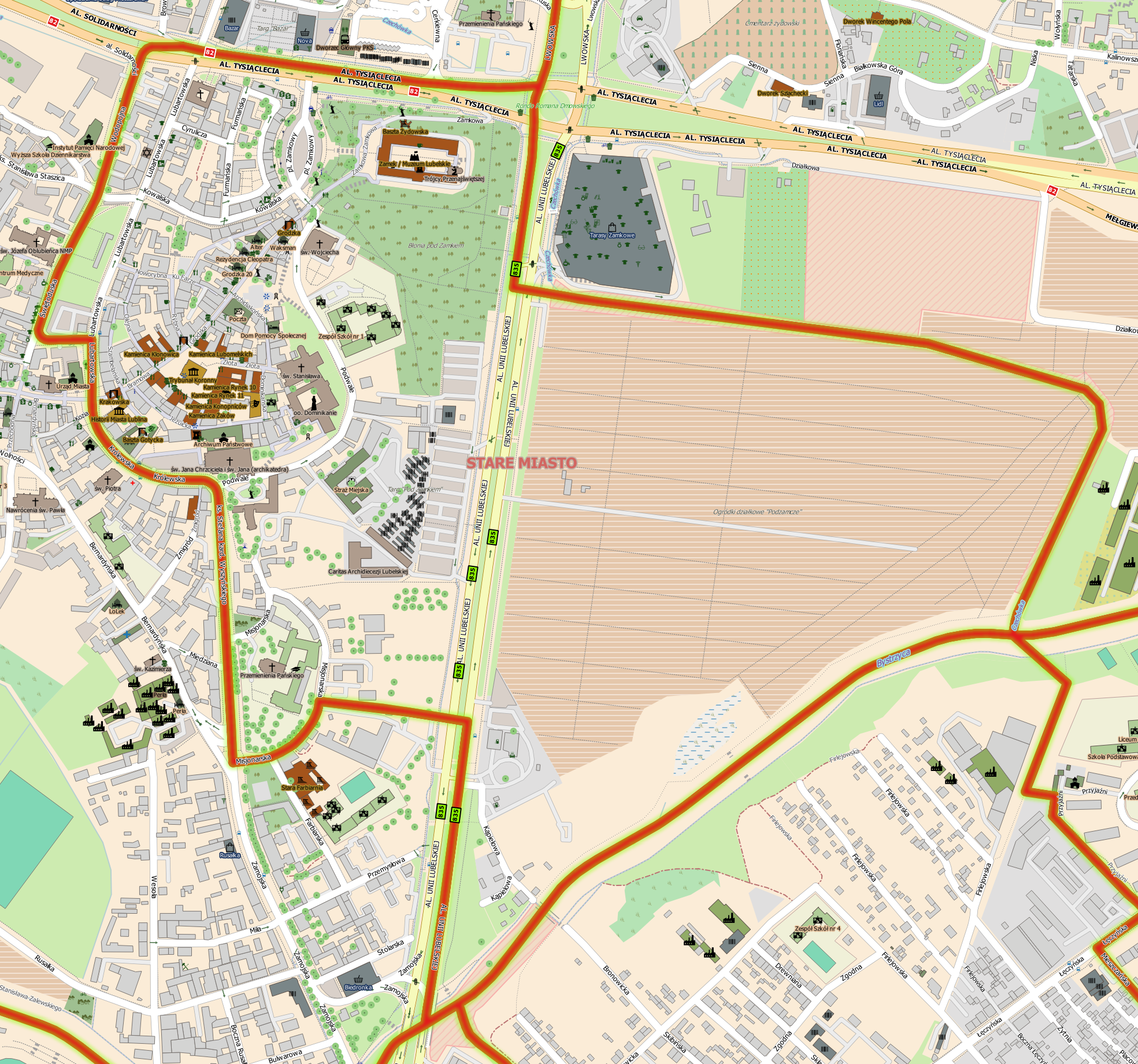 Plan dzielnicy Stare Miasto w Lublinie.